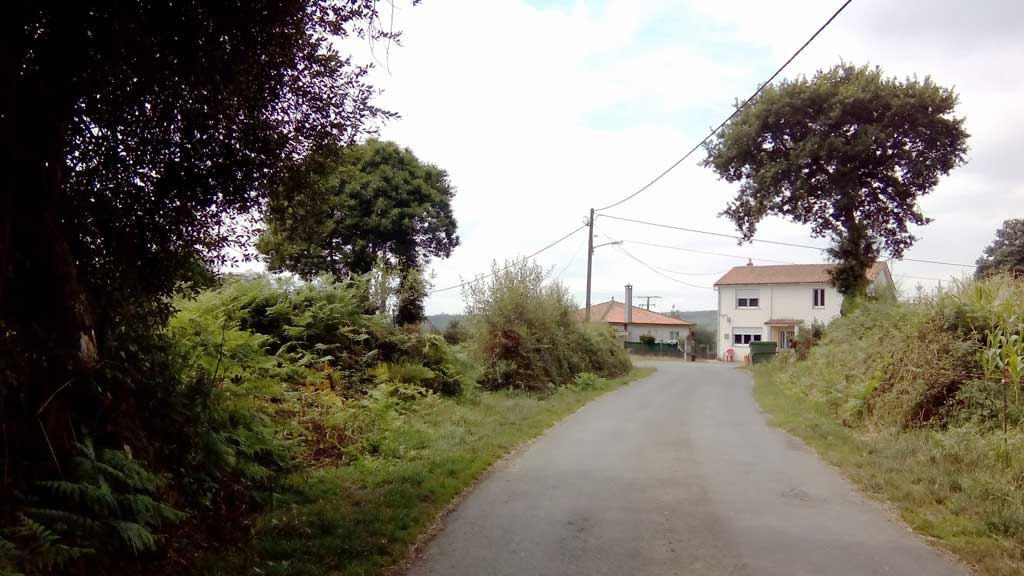 O Igrexario, Curtis.